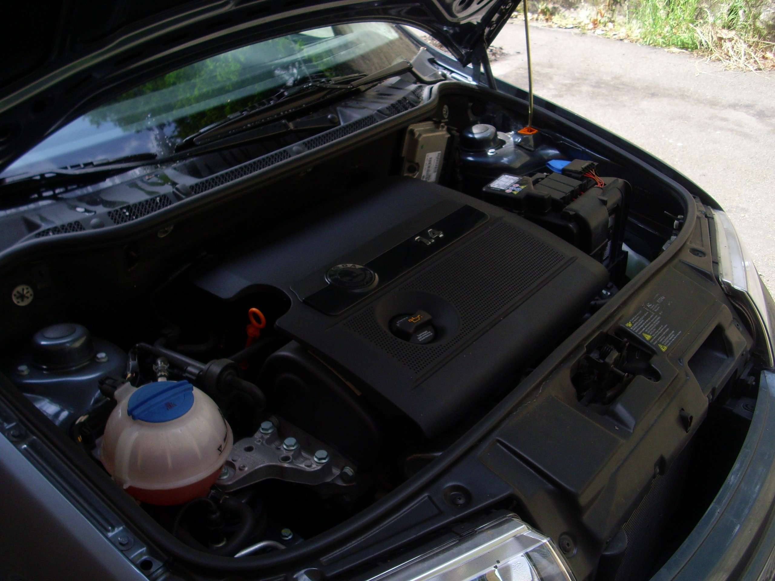 Skoda Fabia 1.4 benzina, vano motore